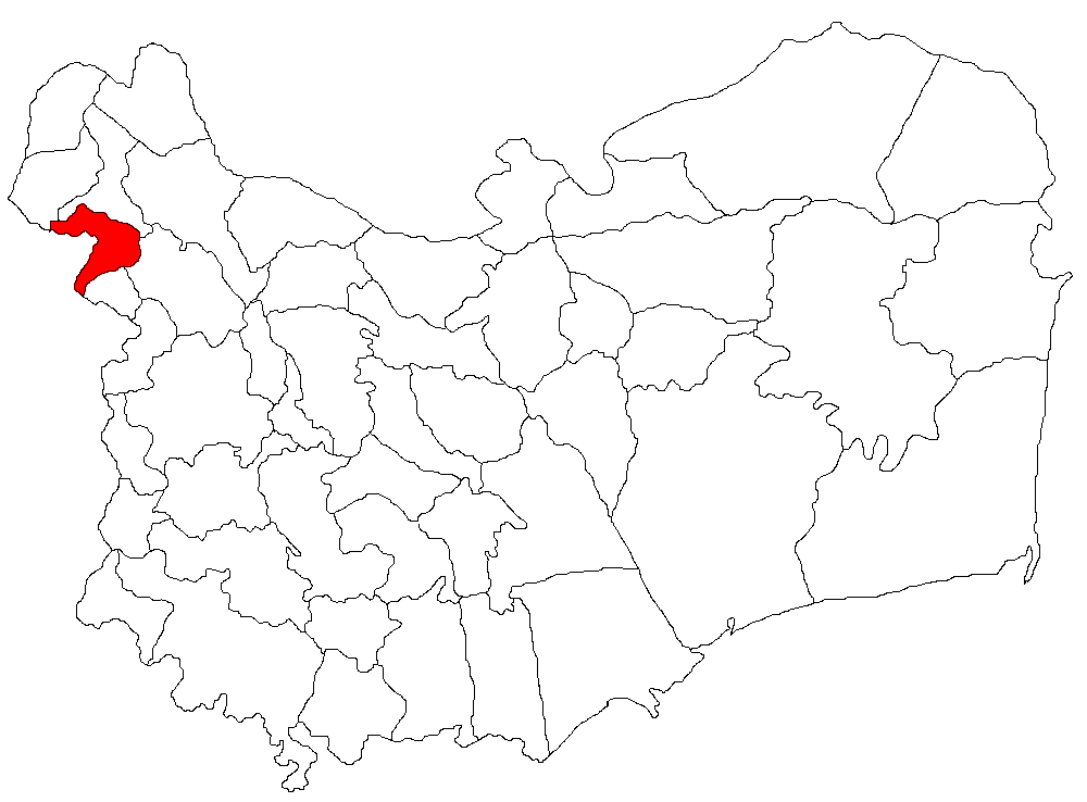 Categorie:Hărţi ale judeţului Tulcea